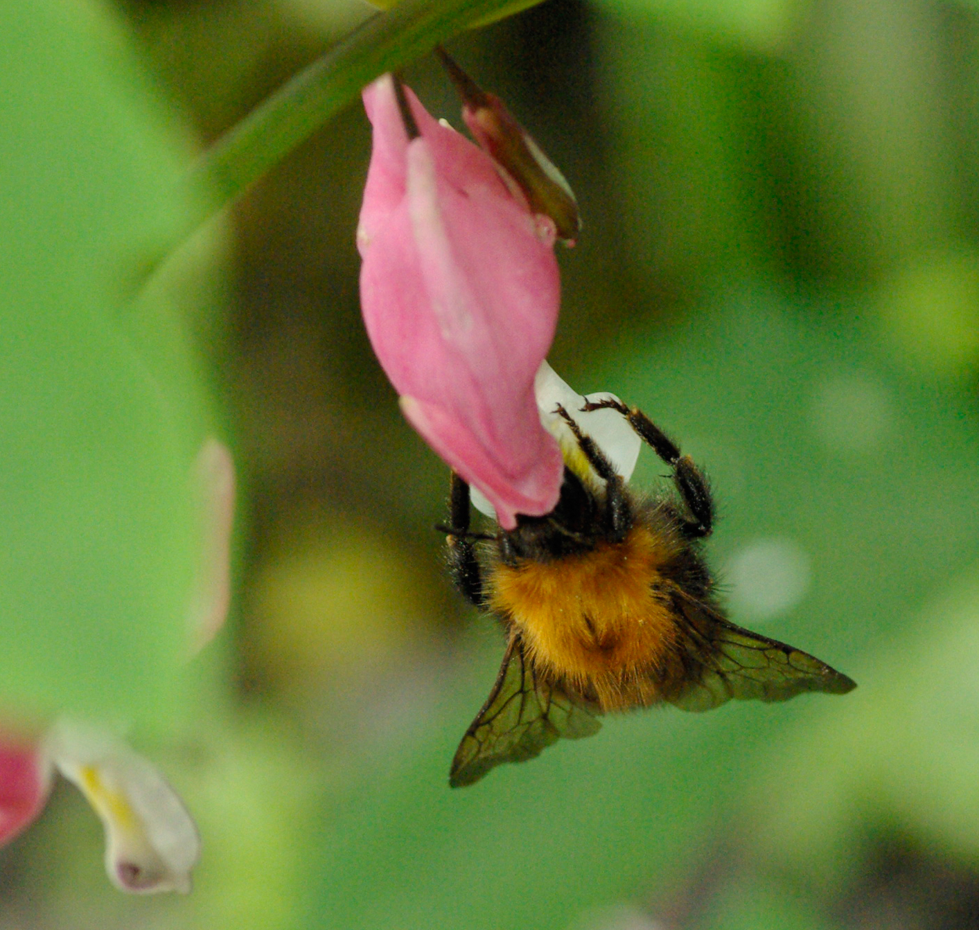 Lushatthumle på løytnantshjerte. Lushatthumla trekker også på andre planter før vertsplanten har begynt å blomstre.